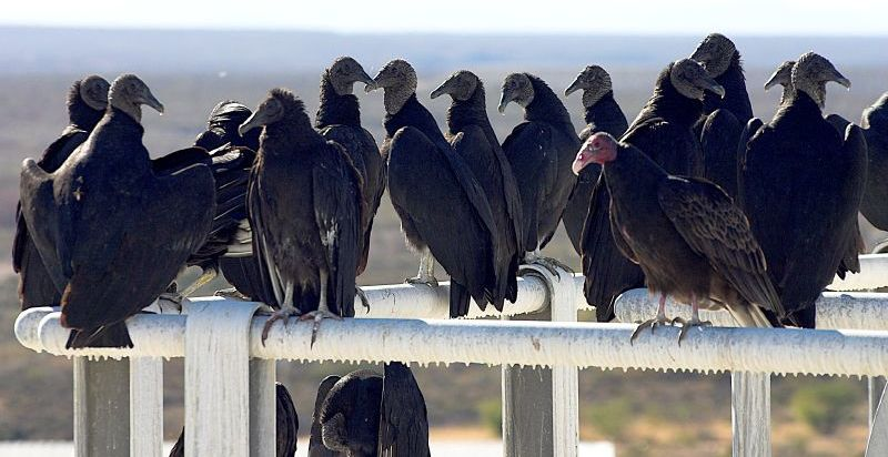 Canon 300D Sigma 70-300 APO